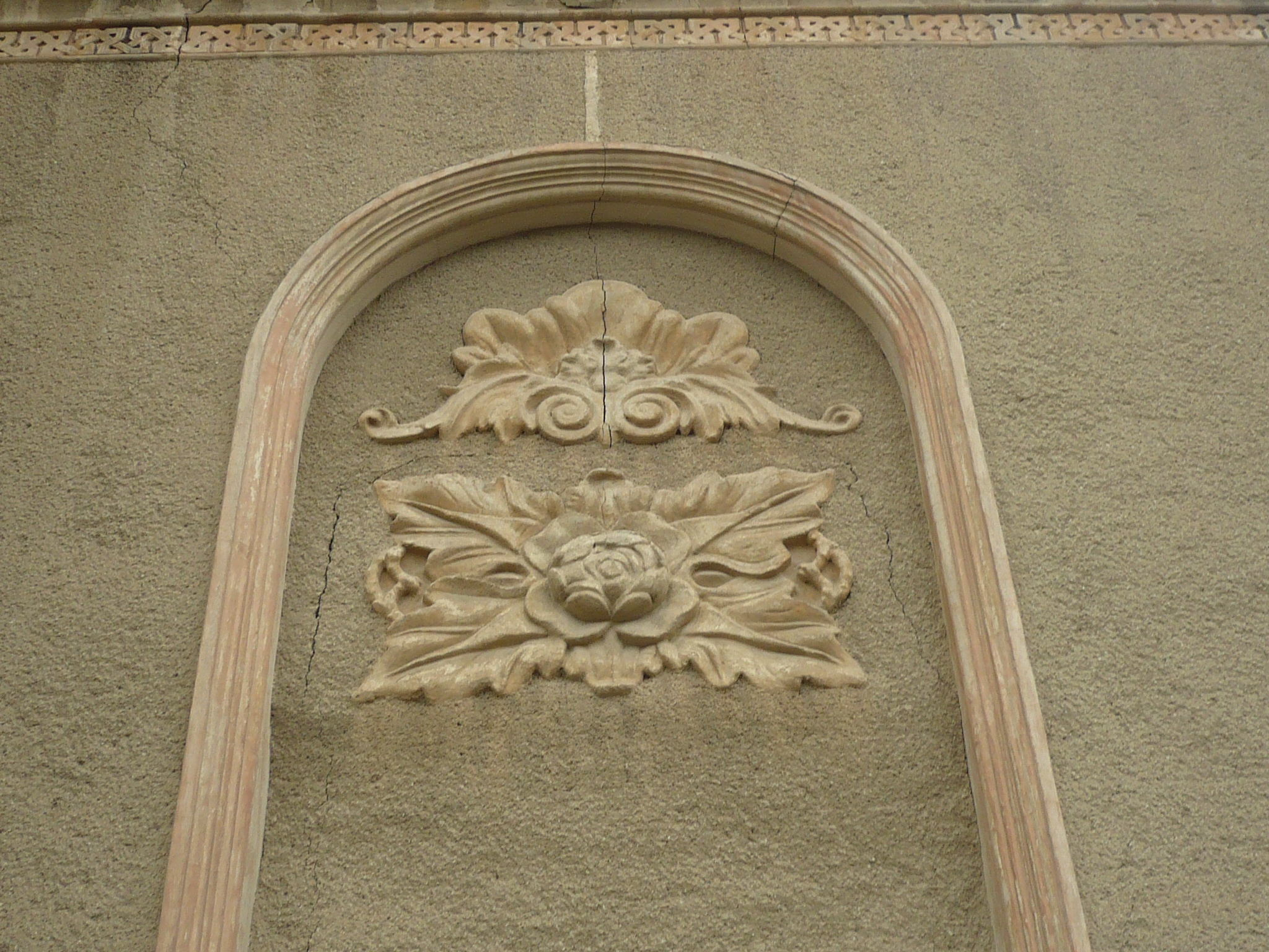 Czortków. Synagoga